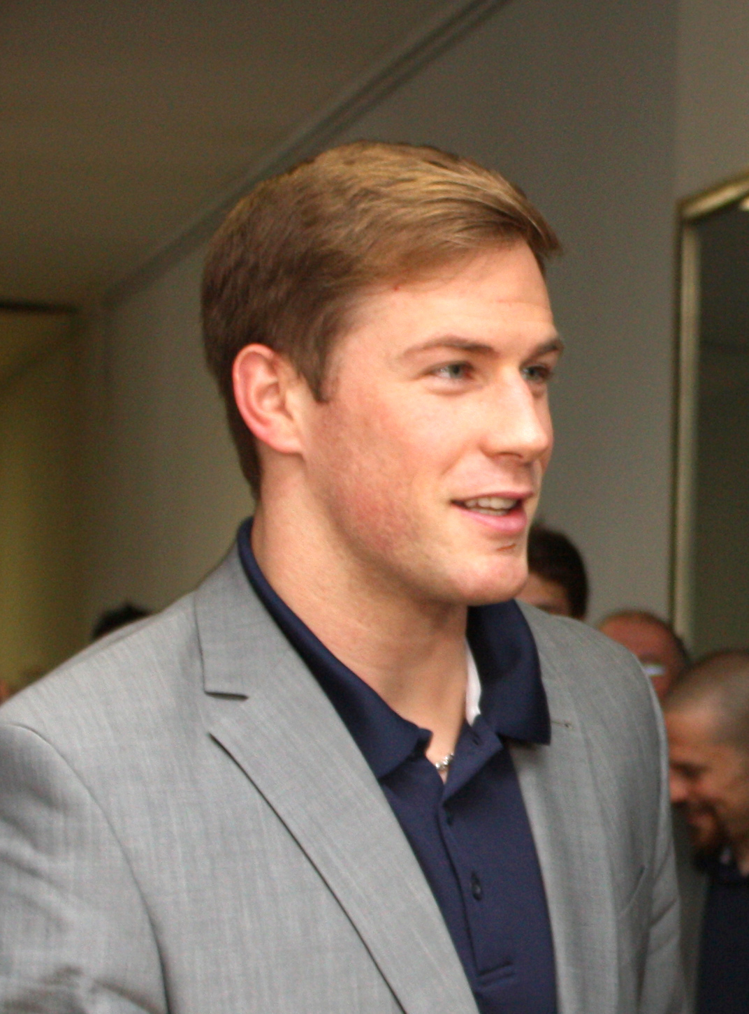 Adler-Kapitän Marcus Kink